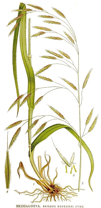 "Skugglosta" is Bromus ramosus Huds., "Strävlosta" is Bromus benekenii (Lange) Trimen (Den virtuella floran) Original Description "Skugglosta", Bromus benekeni Syme.